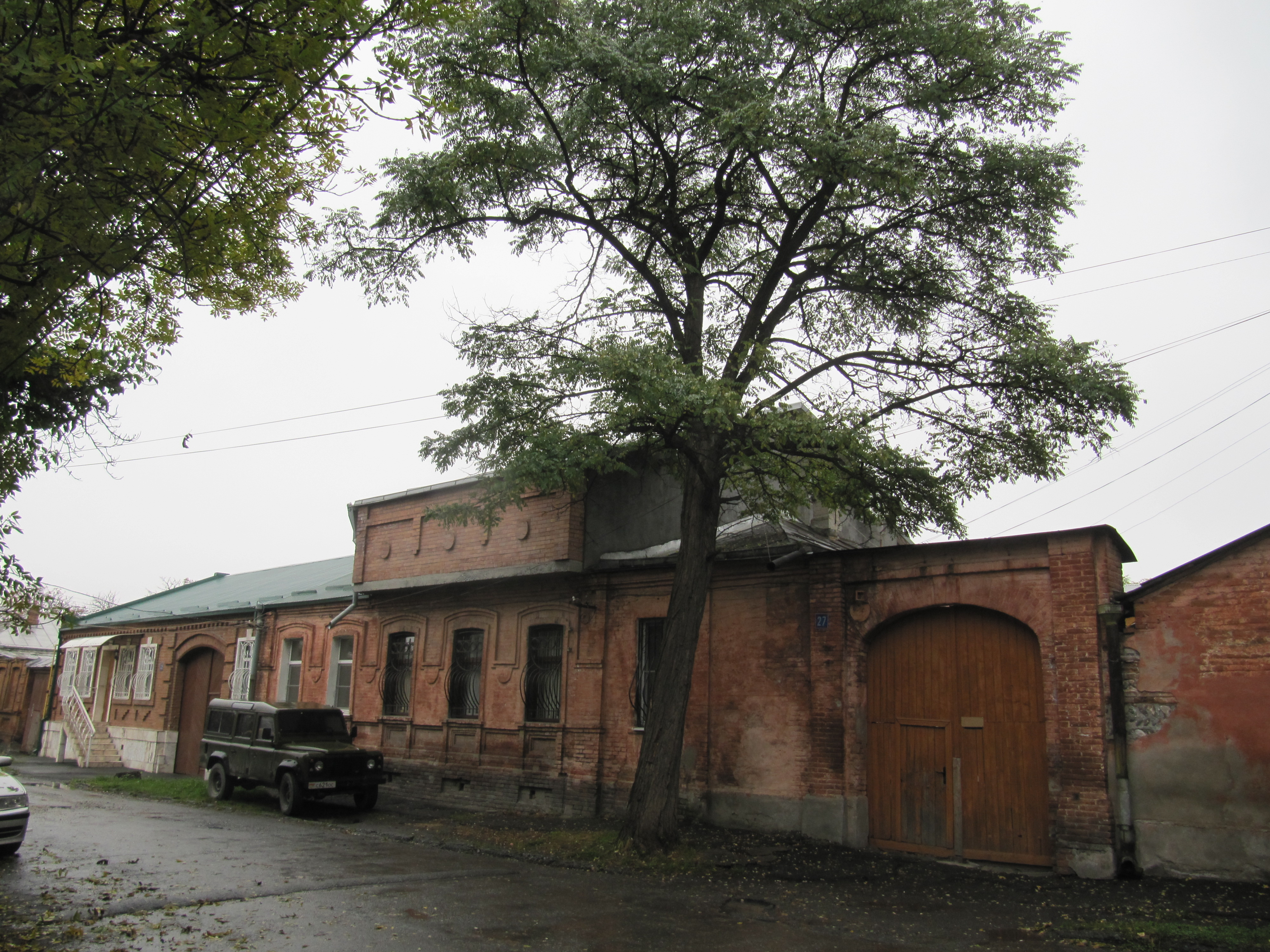 Дом №32 на улице Цаголова, Владикавказ. Памятник истории и культуры Северной Осетии